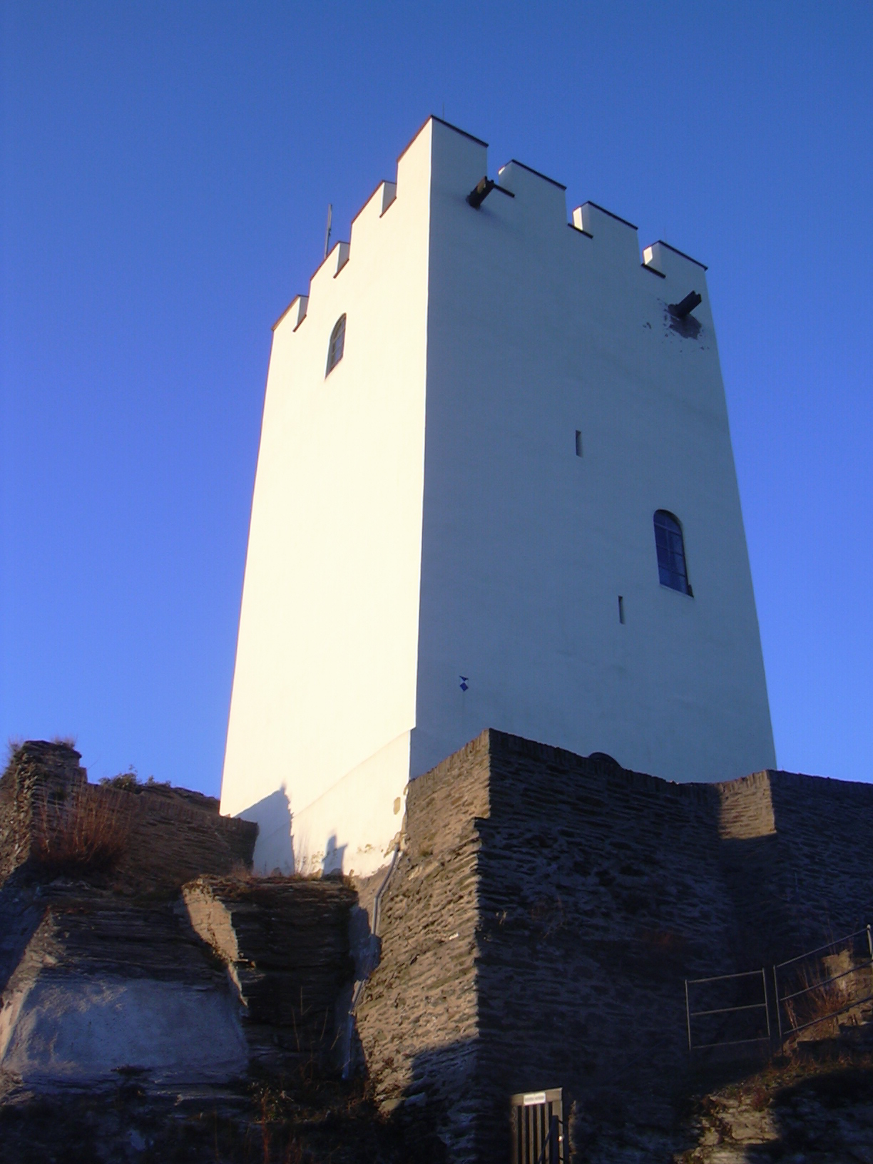 Sterrenberg Castle, keep